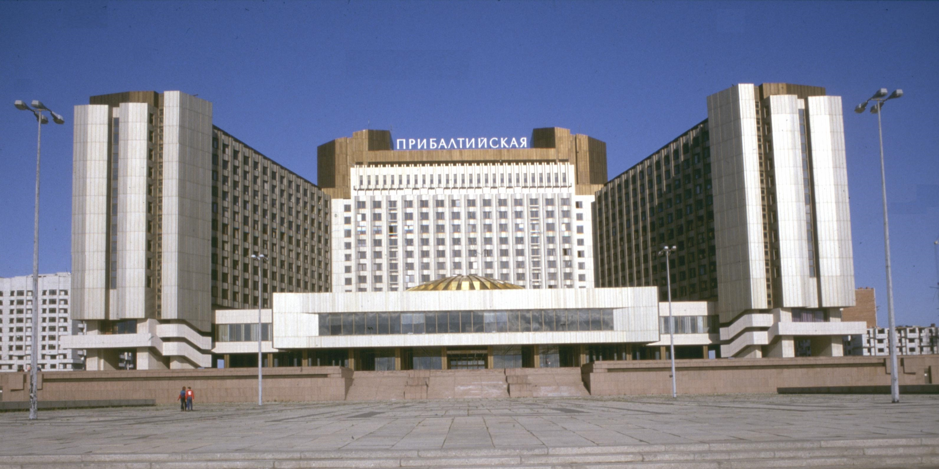 Hotel Pribaltiskaja in St. Petersburg im Jahre 1980 Koord. der Kamera: 59.937945312187324, 30.21067500114441